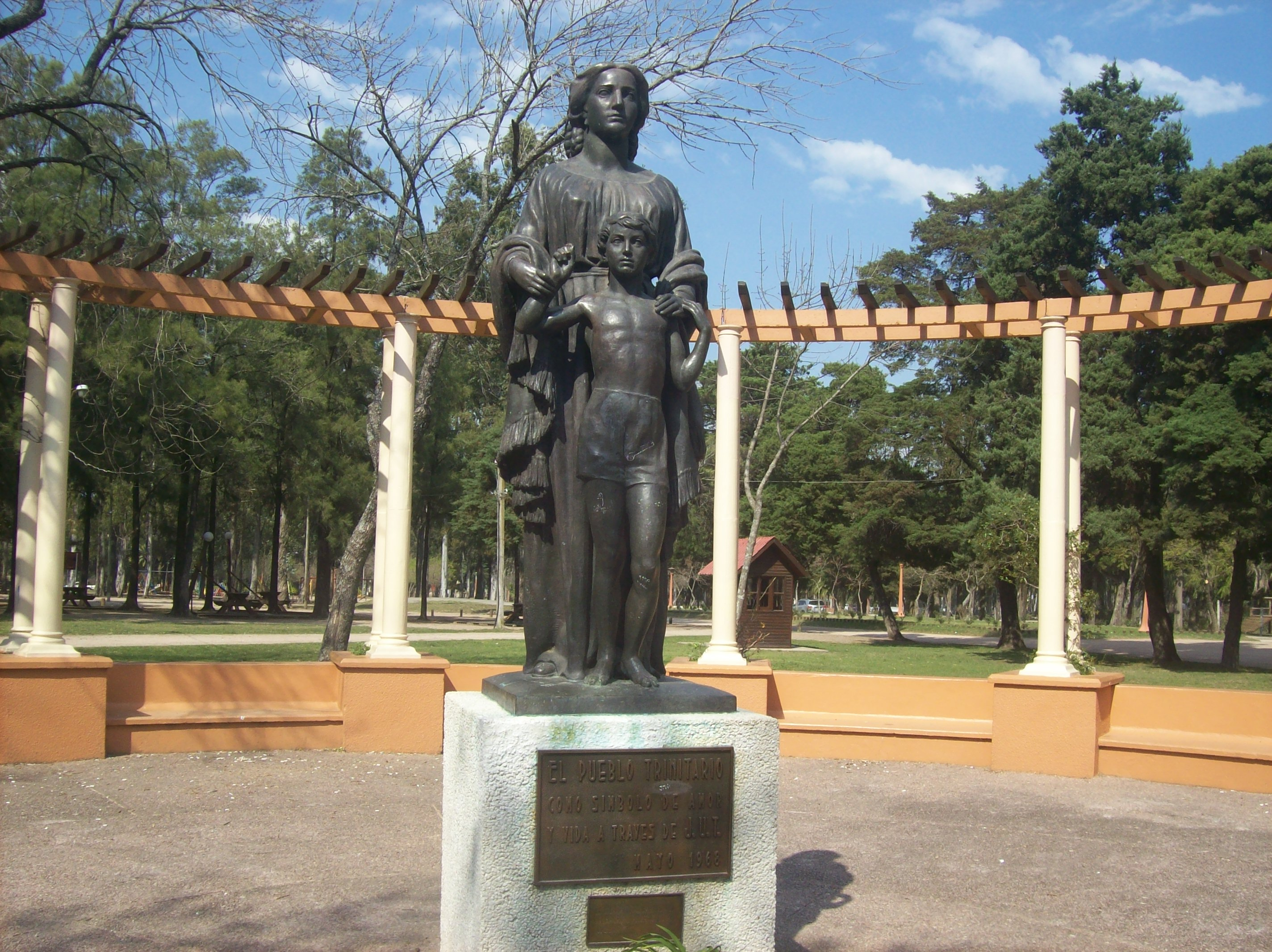 Monumento a la madre. Ubicada en el departamento de Flores